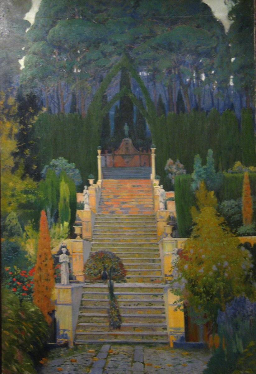 Catalan: Jardí senyorial (Raixa)